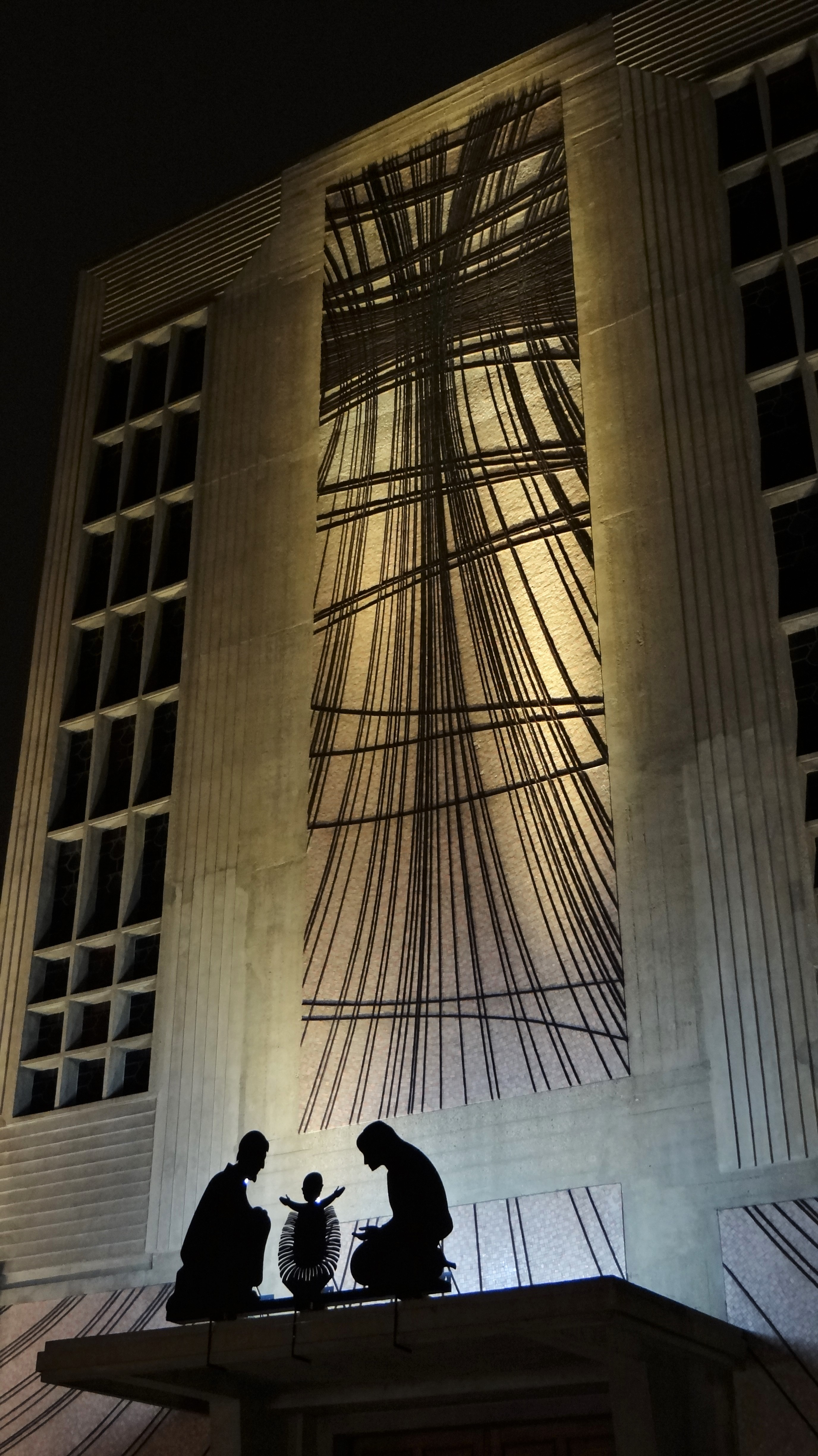 Crèche devant l'Eglise St-Jacques le Majeur, à la sortie du métro M4, Mairie de Montrouge, sortie "Eglise St Jacques"